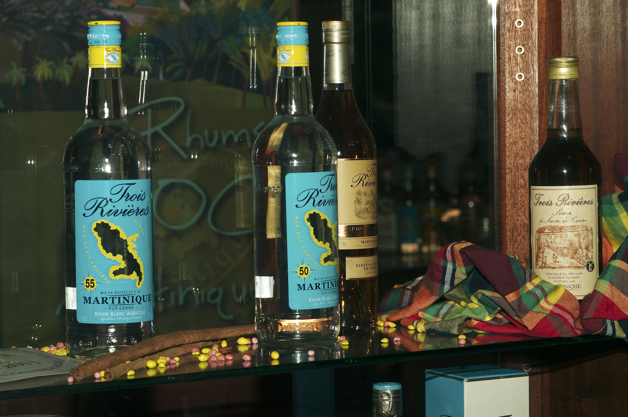 Rhums de la Martinique